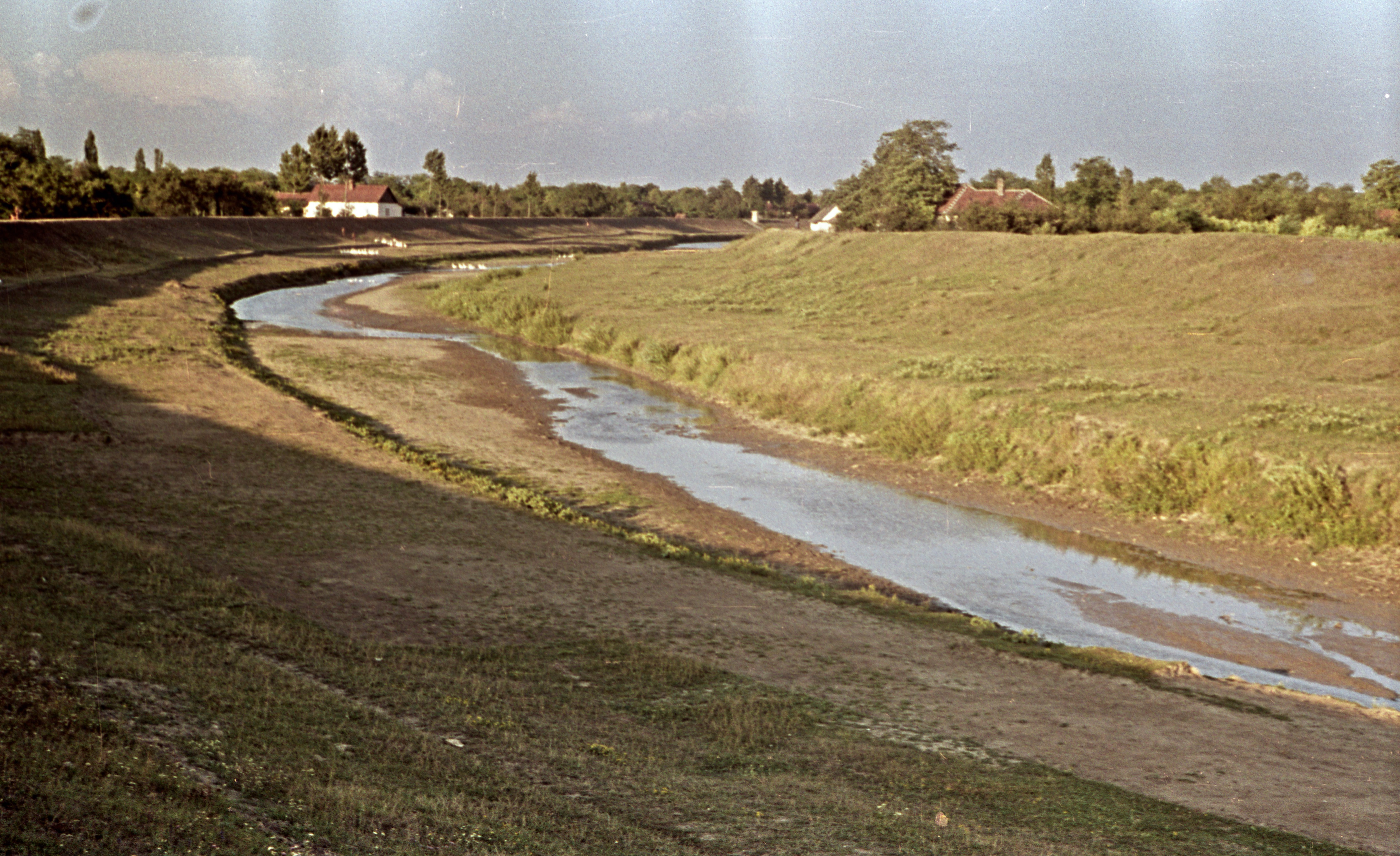 a Holt-Tarna (Tarna) a falu alatt. Location: Hungary, Jászdózsa Title: a Holt-Tarna (Tarna) a falu alatt.